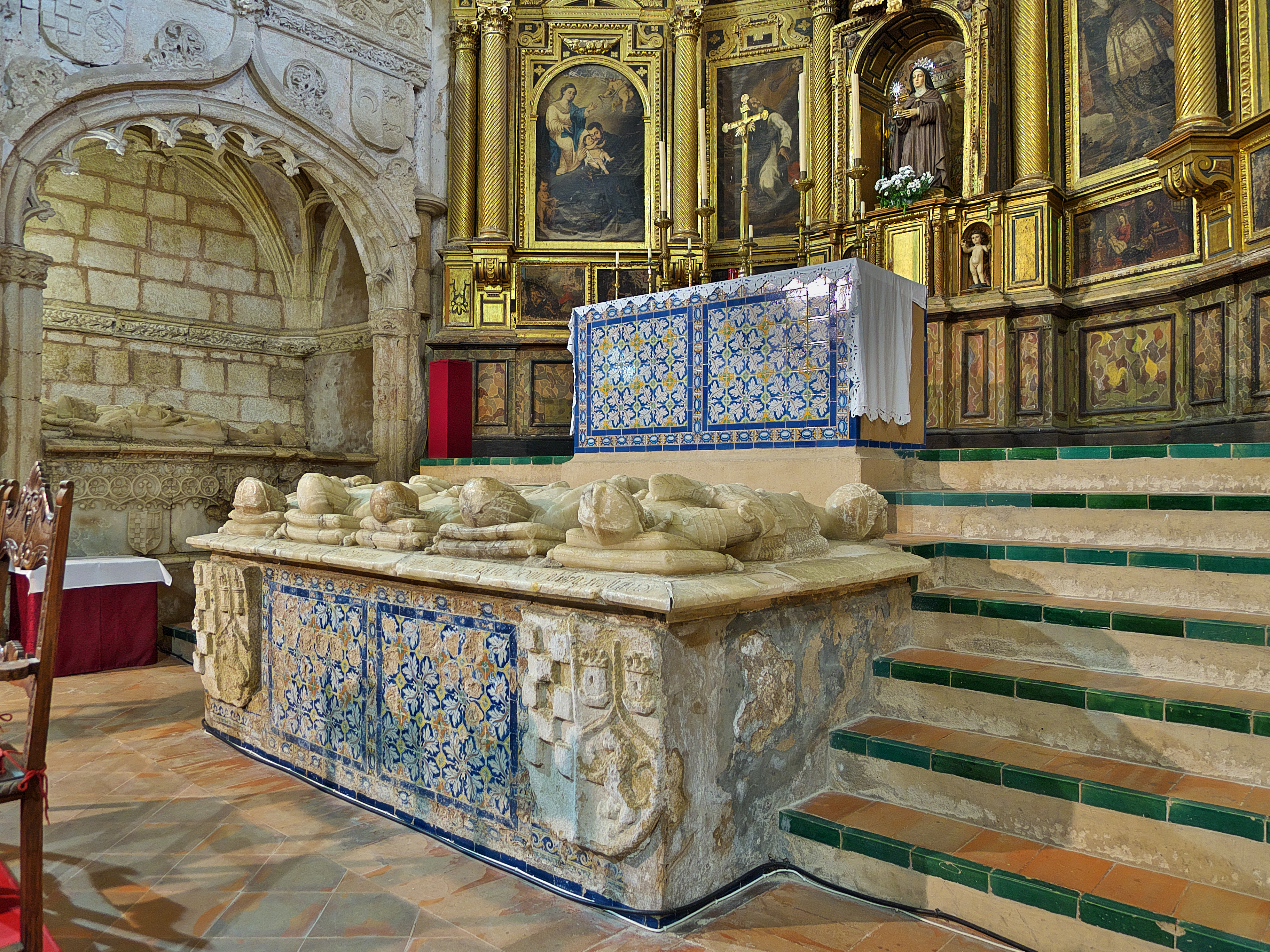 En primer término, los sepulcros de la Casa de Portocarrero (s. XIV).